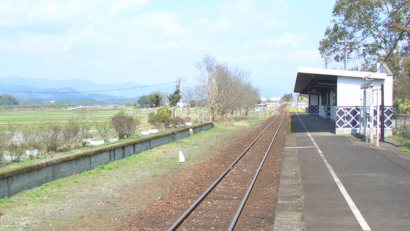 くま川鉄道湯前線ja:一武駅 ホーム 写真手前がja:人吉駅方面。 左側が撤去された線路・交換設備跡。ホームの残骸も見える。 この写真の前の版には、走行中の車内から撮影したホームの画像があります。 撮影者/著者/著作権保有者 : MK Products (本人がアップロード) 撮影日 : 2007/03/14 一武駅用にアップロードした画像です。良い画像があれば別の画像に変えてください。